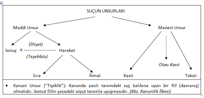 Suçun Unsurları